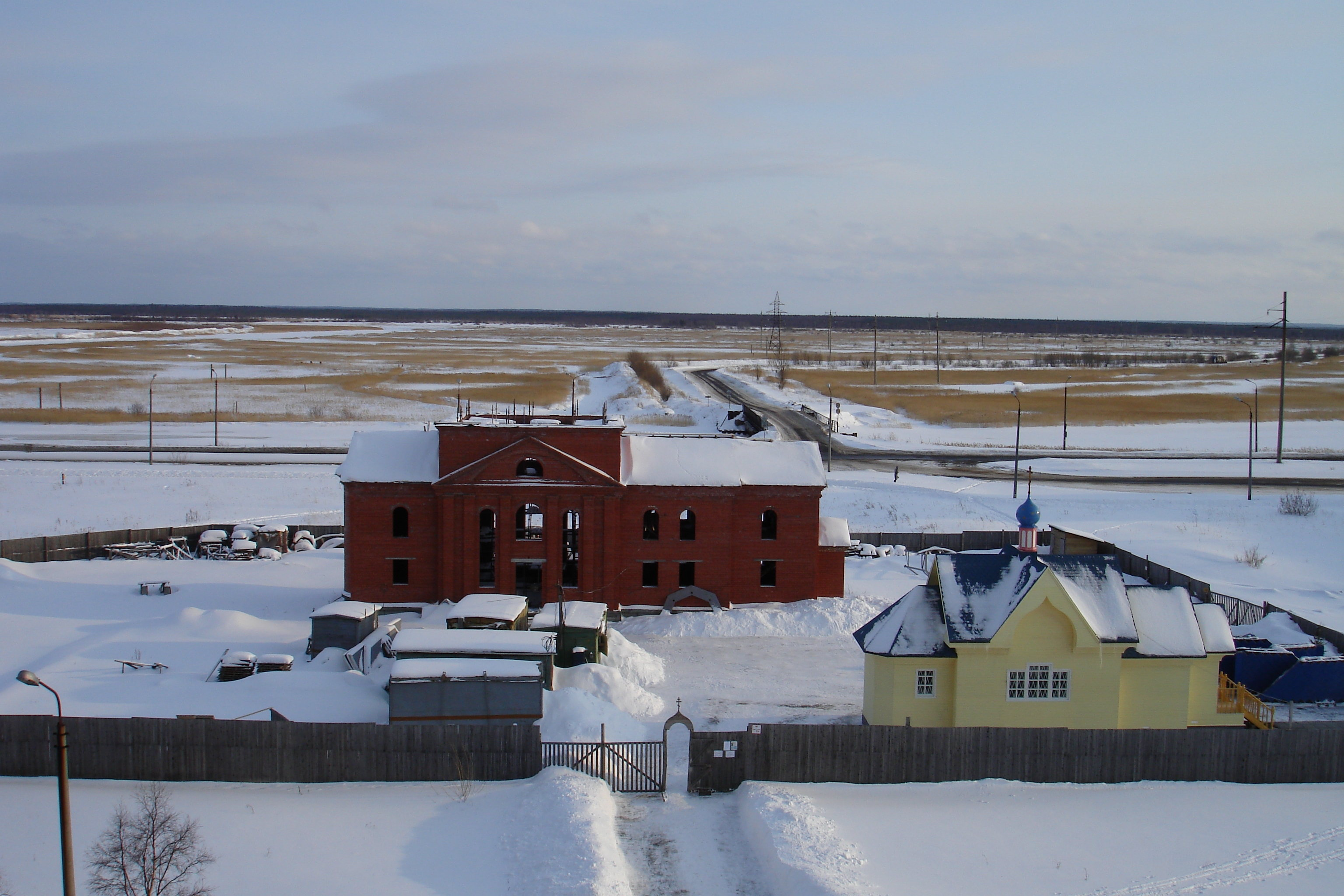 Строительство каменного Храма Иконы Божией Матери "Владимирской" в Северодвинске. Справа: деревянный Храм преподобномученников Вениамина и Никифора.